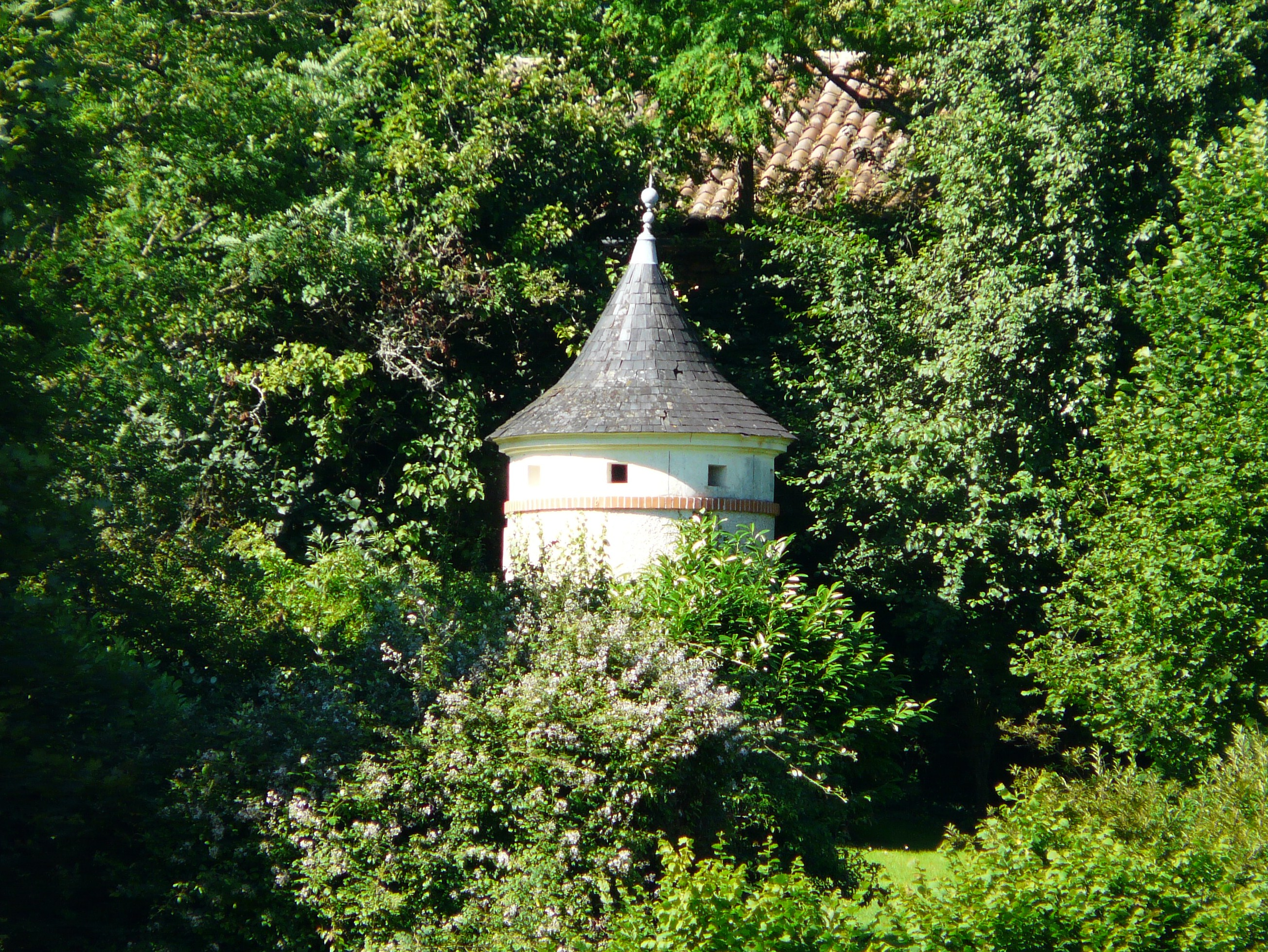 Le pigeonnier du château de Monciaux, Bourrou, Dordogne, France.